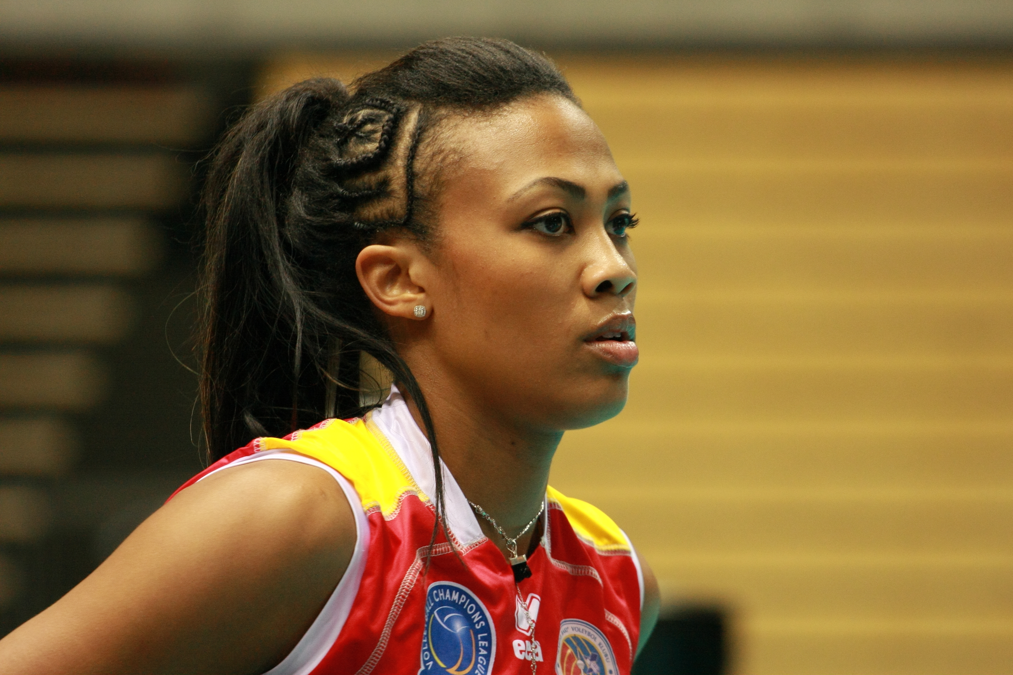 Atom Trefl Sopot vs Rabita Baku